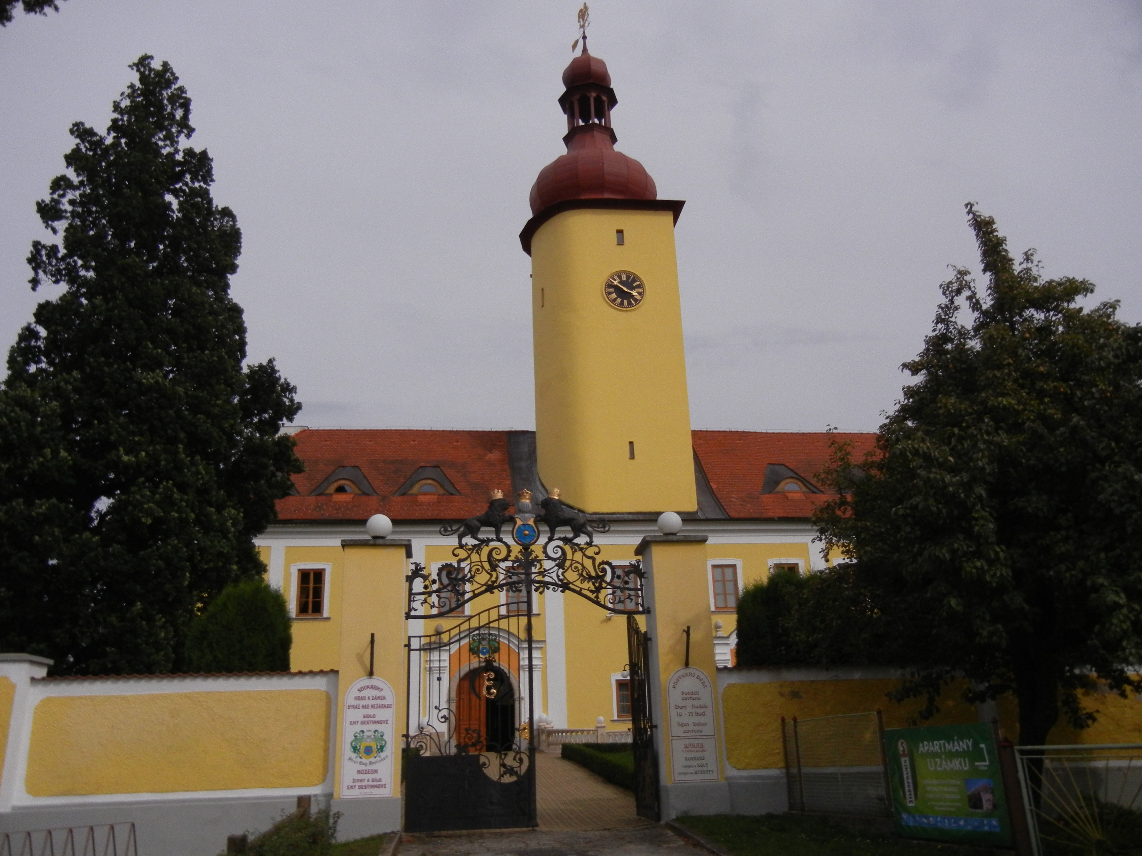 Zámek Stráž nad Nežárkou, Stráž nad Nežárkou 1